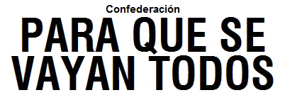 Confederacion Para que se vayan Todos